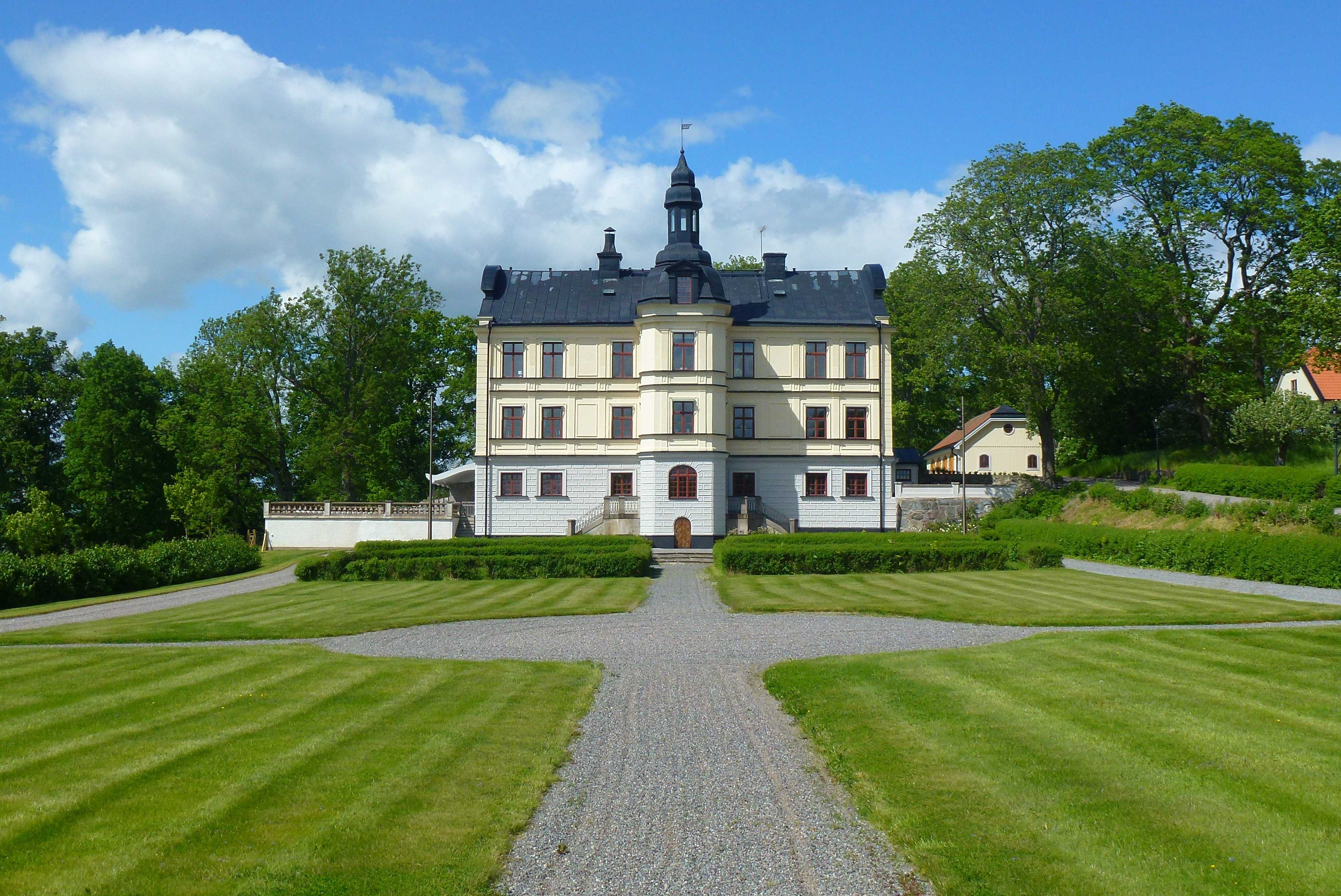 Torsåker herrgård